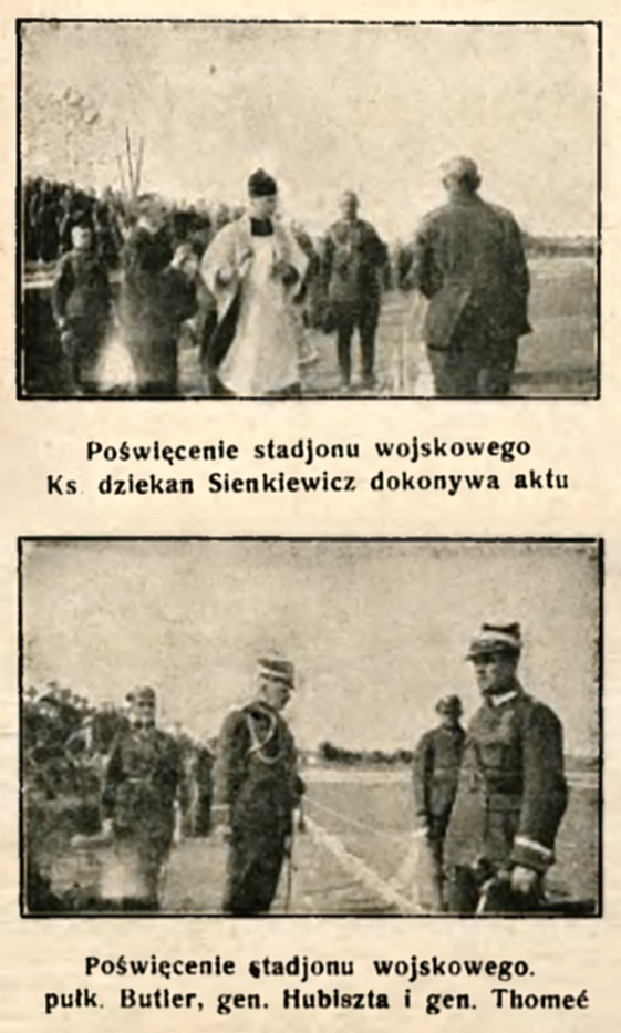 Uroczystość otwarcia wojskowego stadionu VIII DOK w Toruniu w dniu 17 sierpnia 1924 roku.